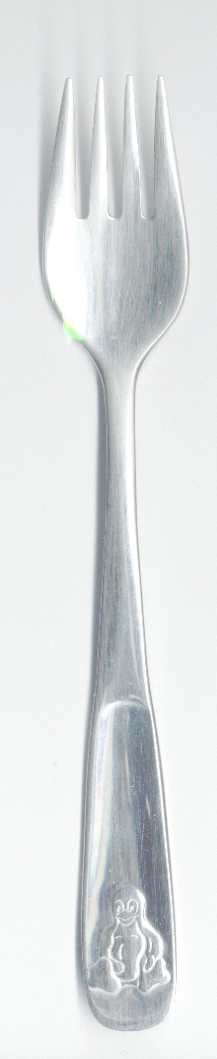 Das Foto ist von mir aufgenommen und zeigt die Vorderseite einer WMF-Gabel aus der 4 teiligem Kinderbesteck-Serie "SEELÖWE". Wie unschwerer zu erkennen, mit dem Linux-Tux. Zum Beweis: Foto von Rückseite unter Image:Tux-gabel-hinten.jpg.